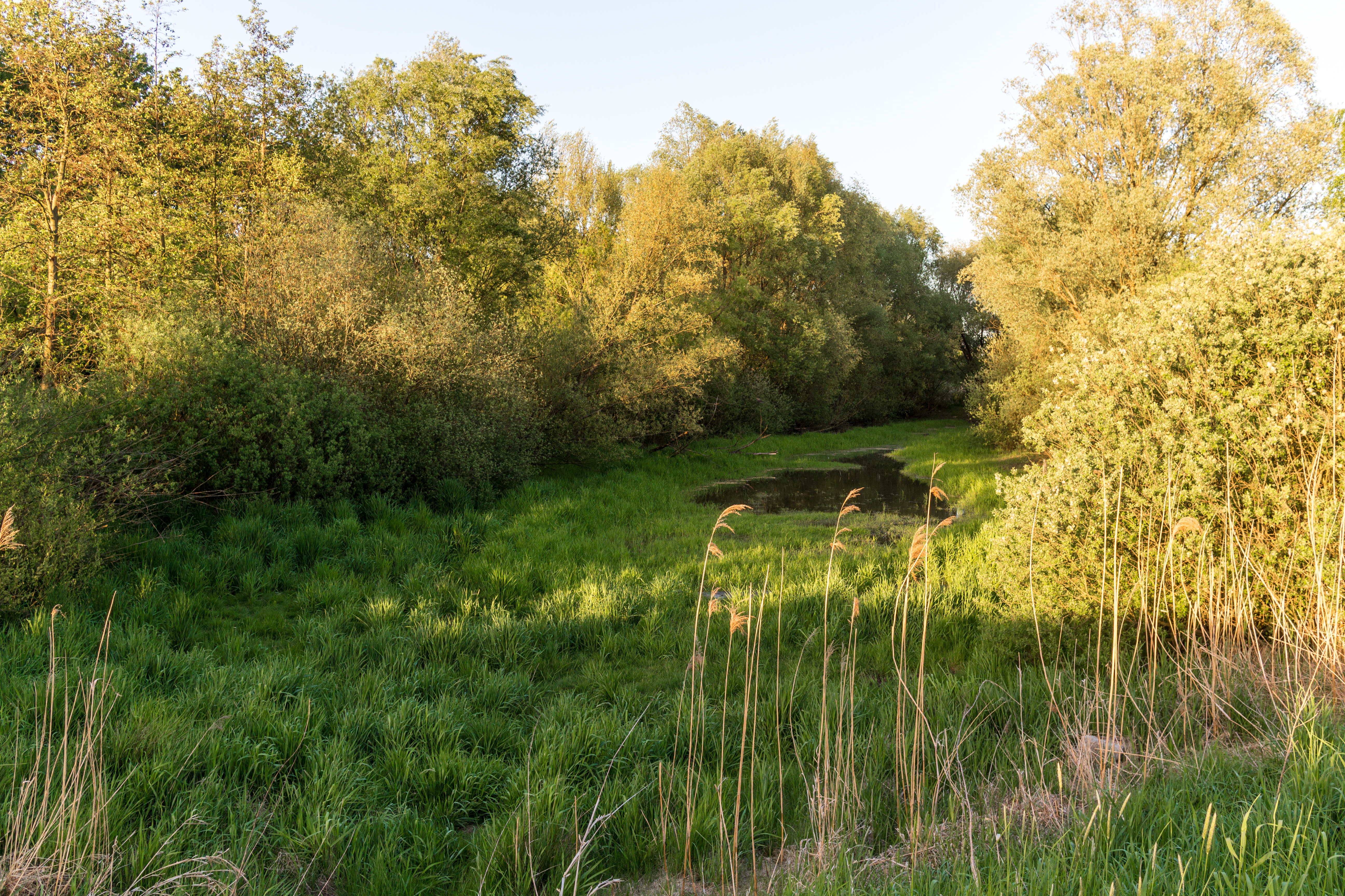 LSG Hönower Weiherkette - Froschweiher